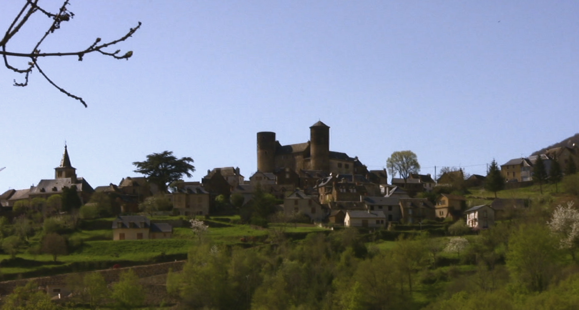 "Pomayrols city" vue générale (versant Sud-Est)